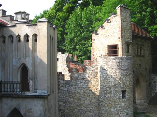 Zespół Pałacowo Parkowy w Młoszowej.